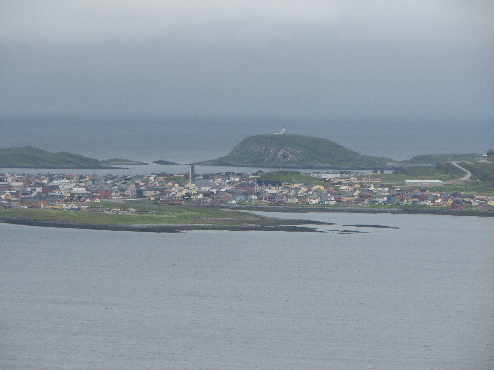 Vardø by